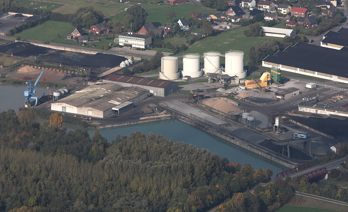 Luftbildaufnahme Hamm, Datteln-Hamm-Kanal, Hafen Uentrop